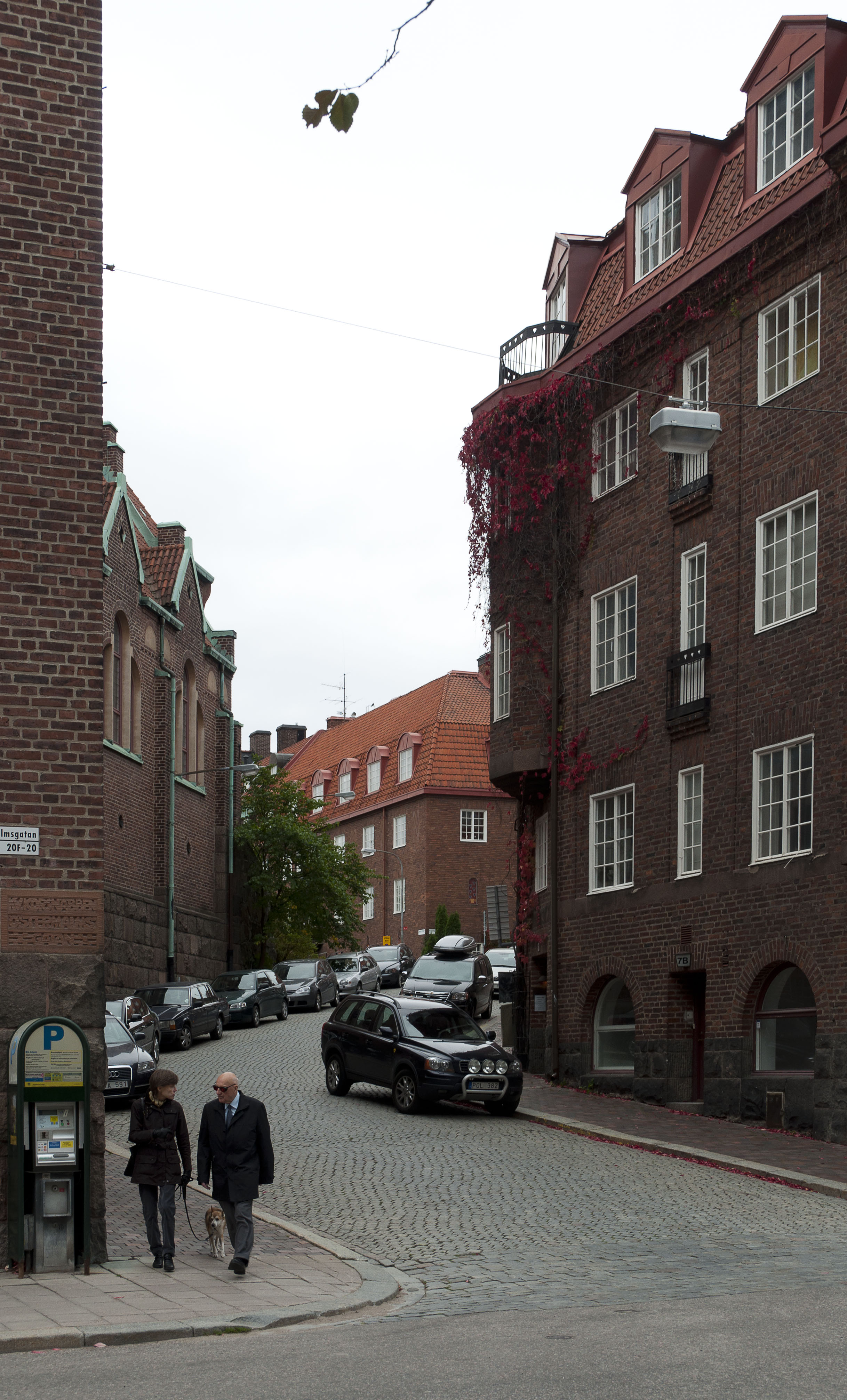 Engelbrekts kyrkogata, Stockholm